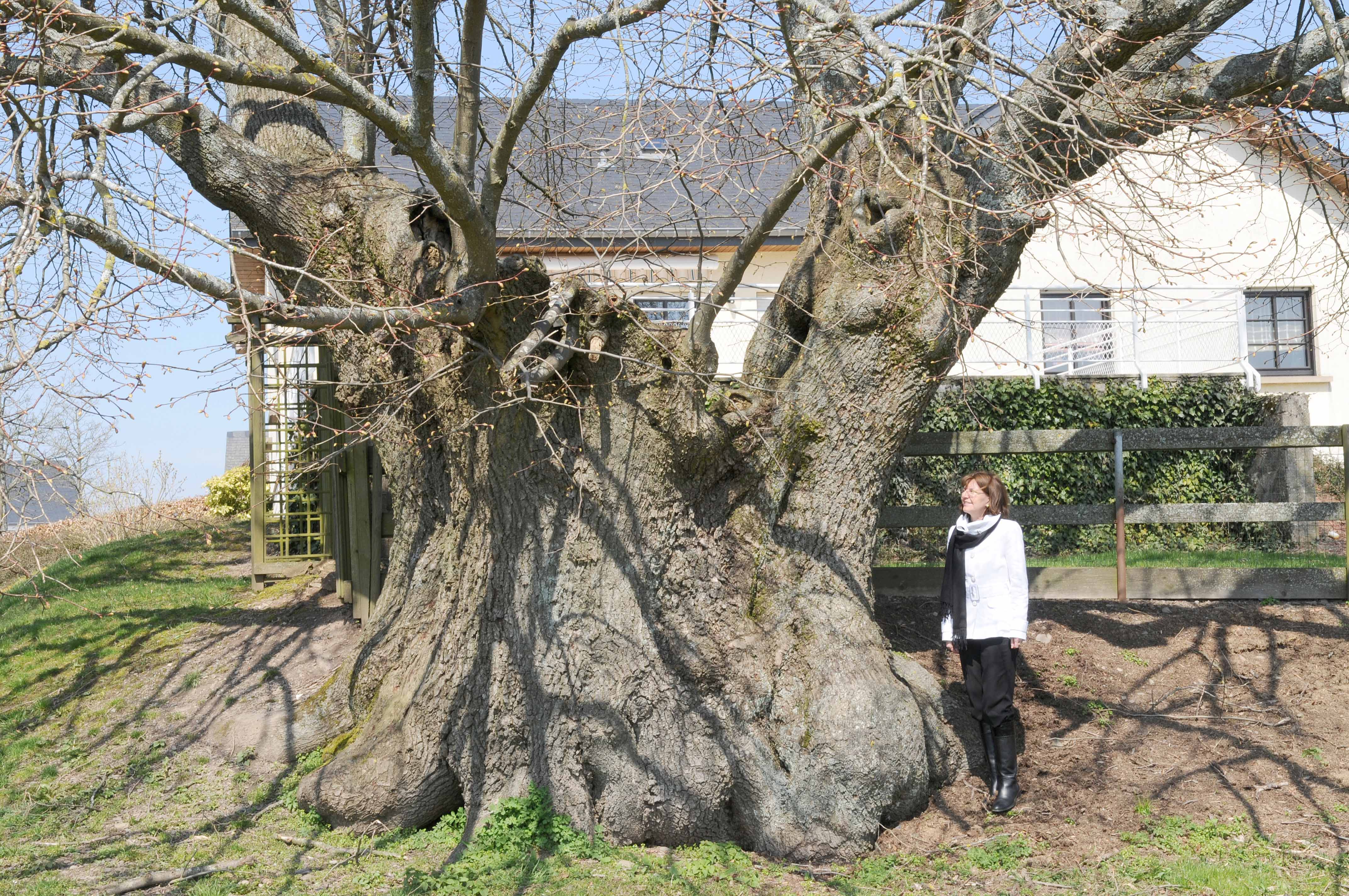 Lann zu Pëtscht.